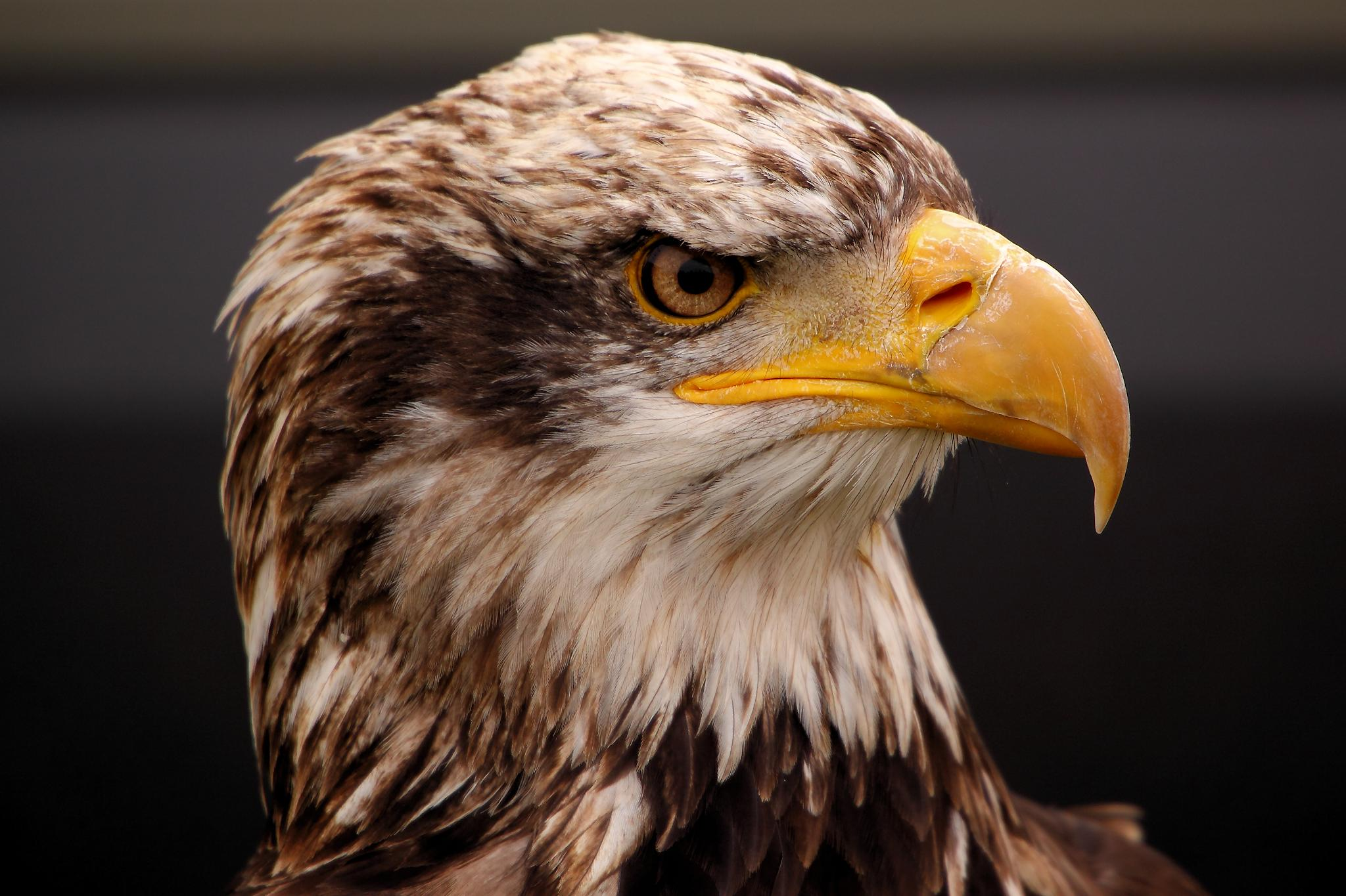 Eagle - Abingdon 2013